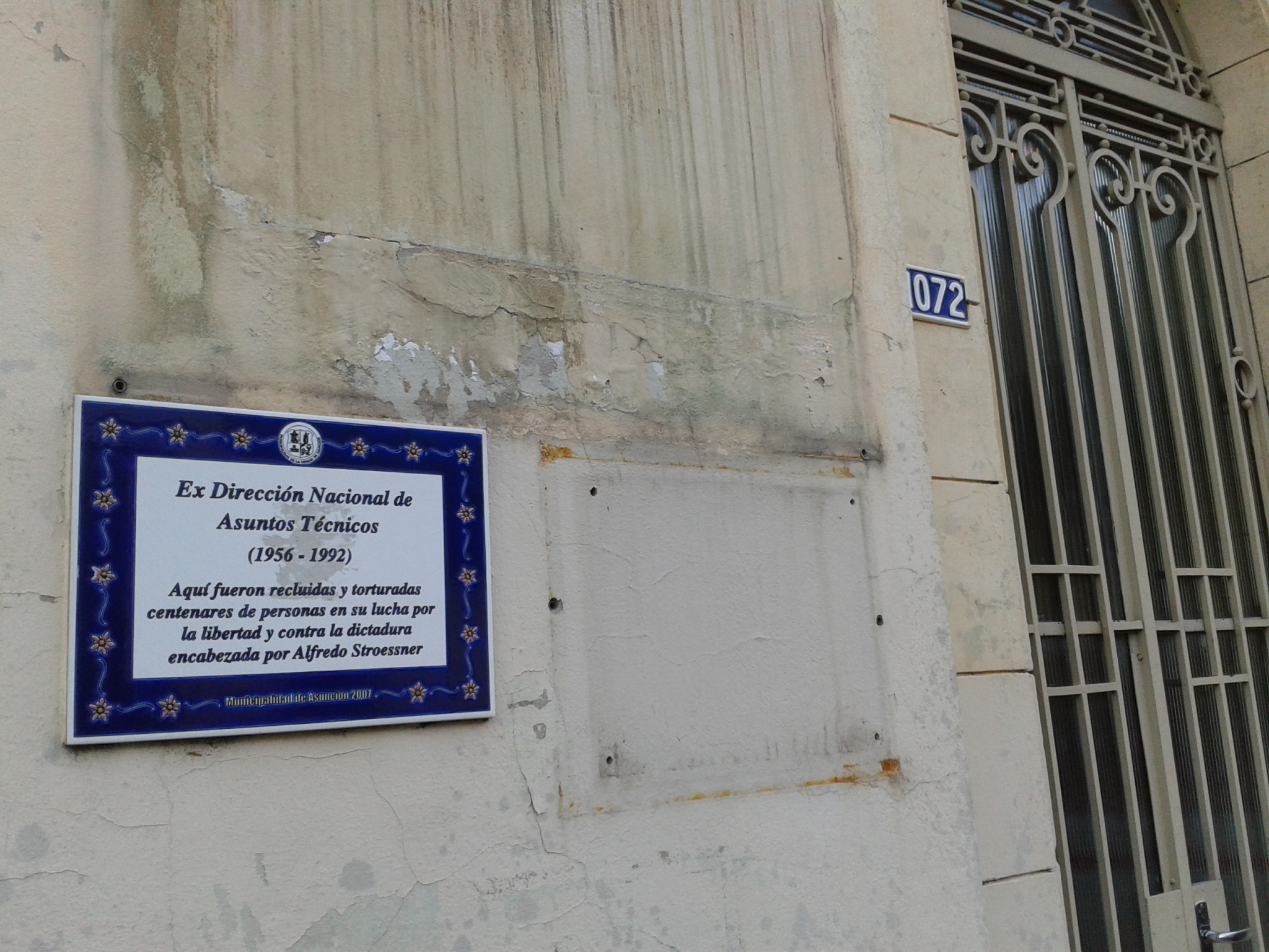 La placa dice: "Aquí fueron recluidas y torturadas centenares de personas en su lucha por la libertad y contra la dictadura encabezada por Alfredo Stroessner"